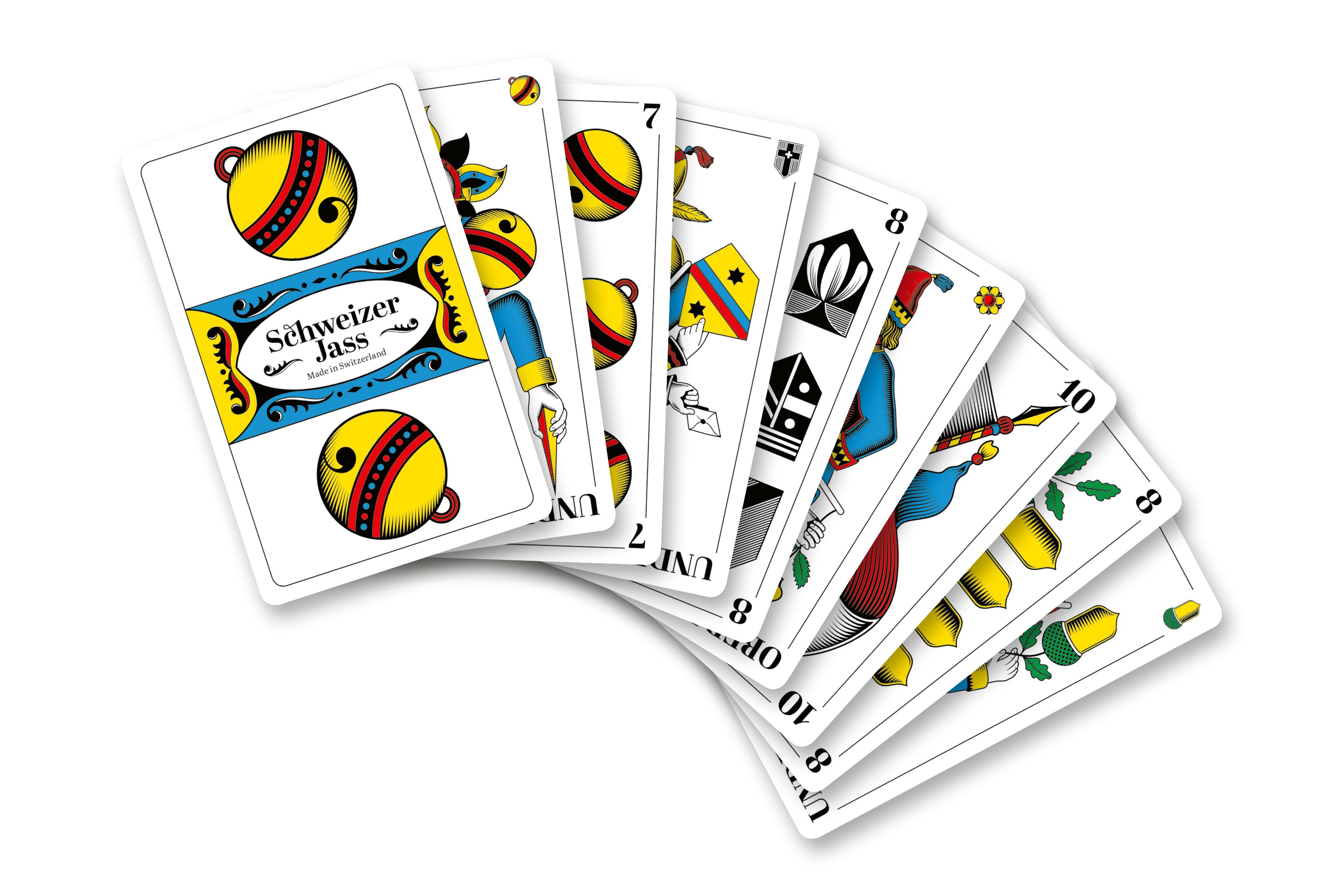 Deutschweizer Jasskarten gefächert